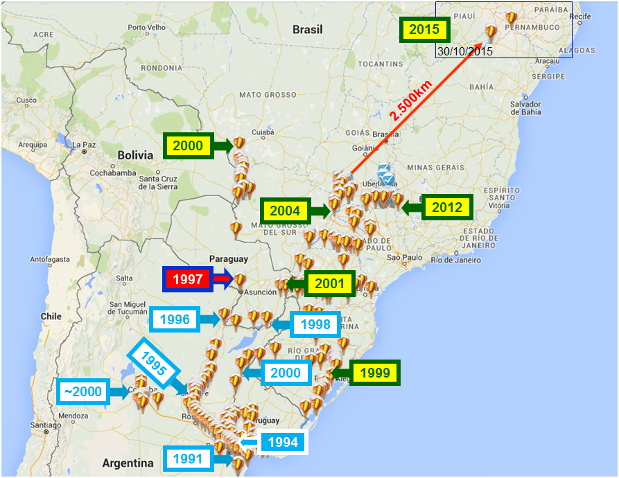 Dispersión de Limnoperna fortunei en América del Sur. Datos tomado de Darrigran & Damborenea, 2006